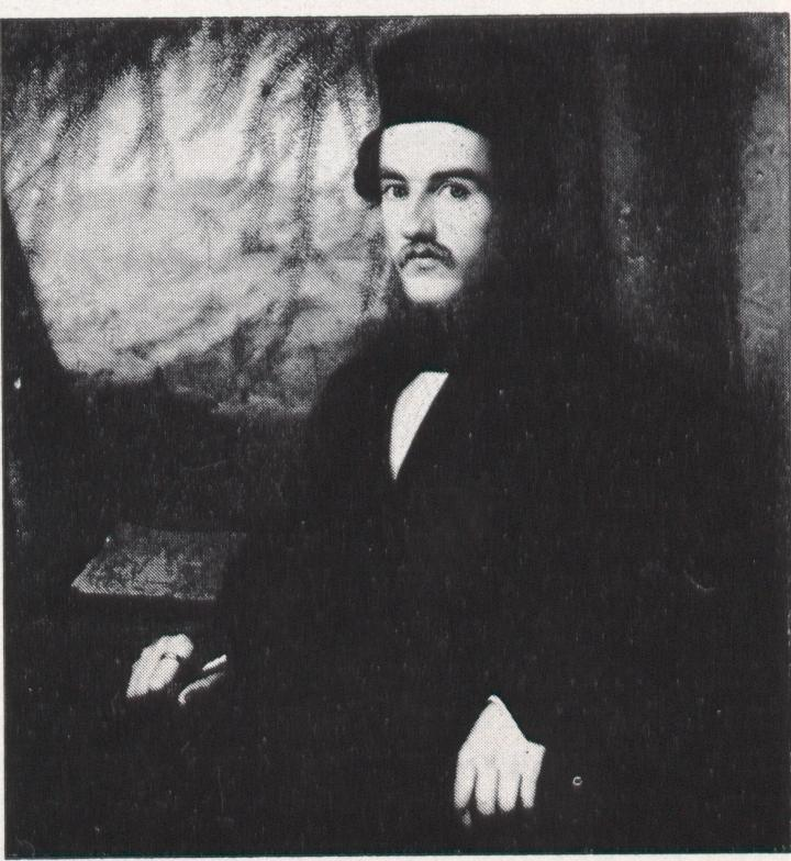 Franz Schmitt (1816-1891), Frankenthal, Selbstportrait in Öl, um 1850